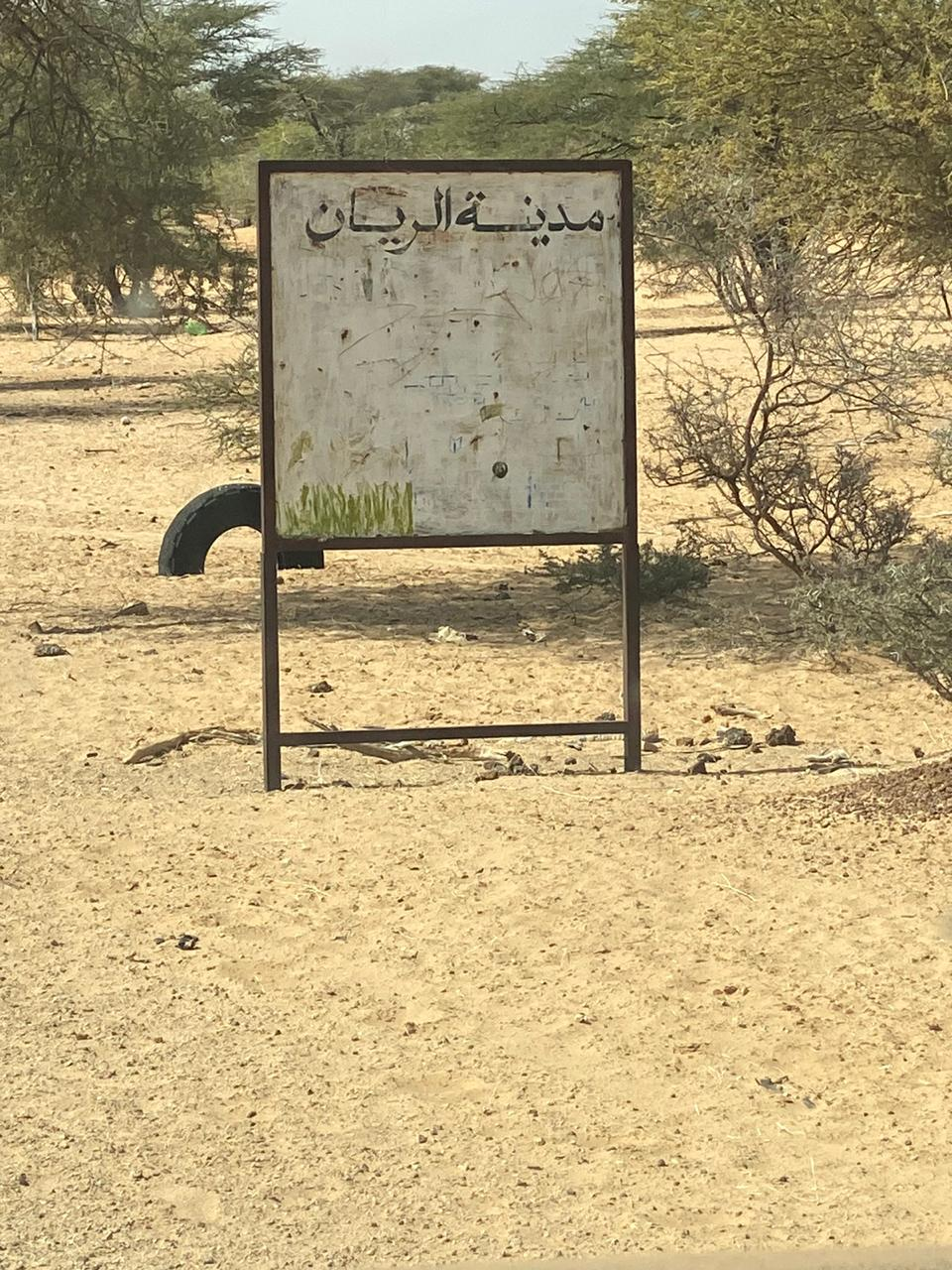 صورة من مدخل الريان